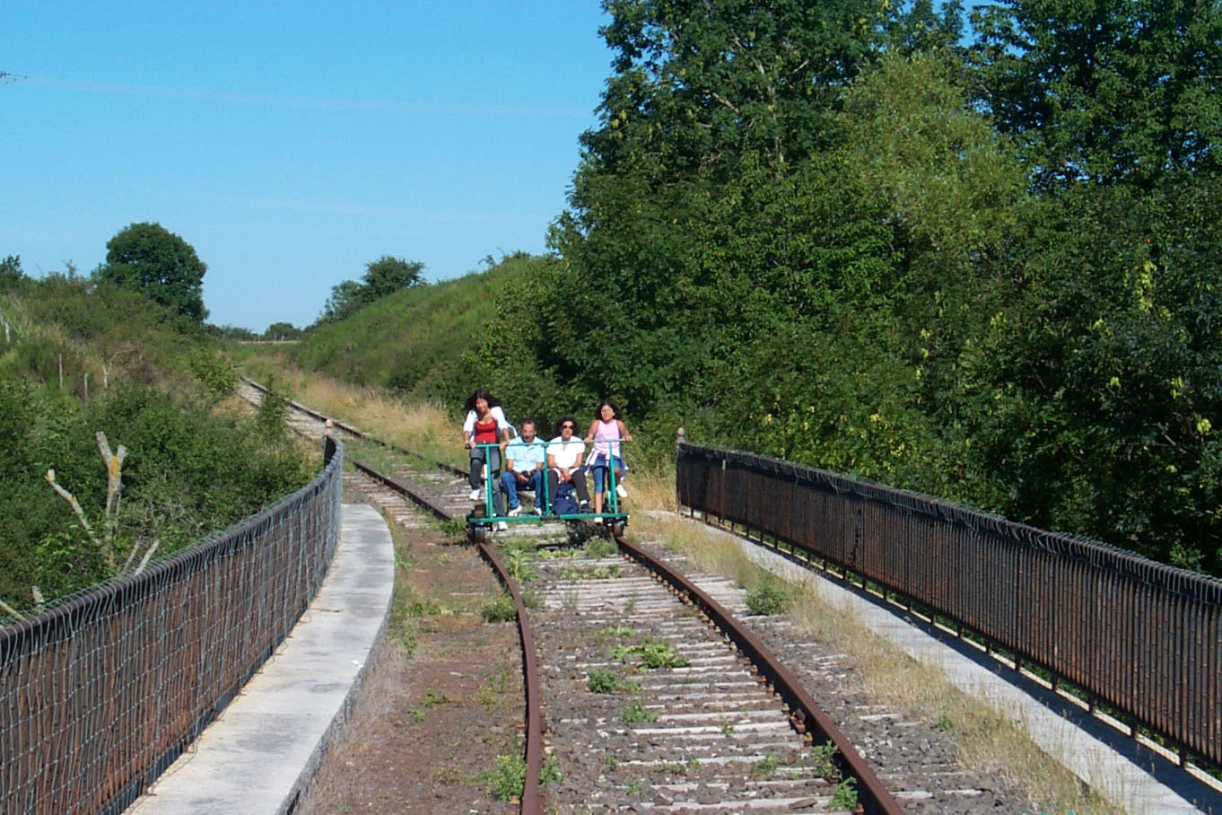 Vélo rail de Pradelles en 2002 (Pradelles, Haute-Loire, France)